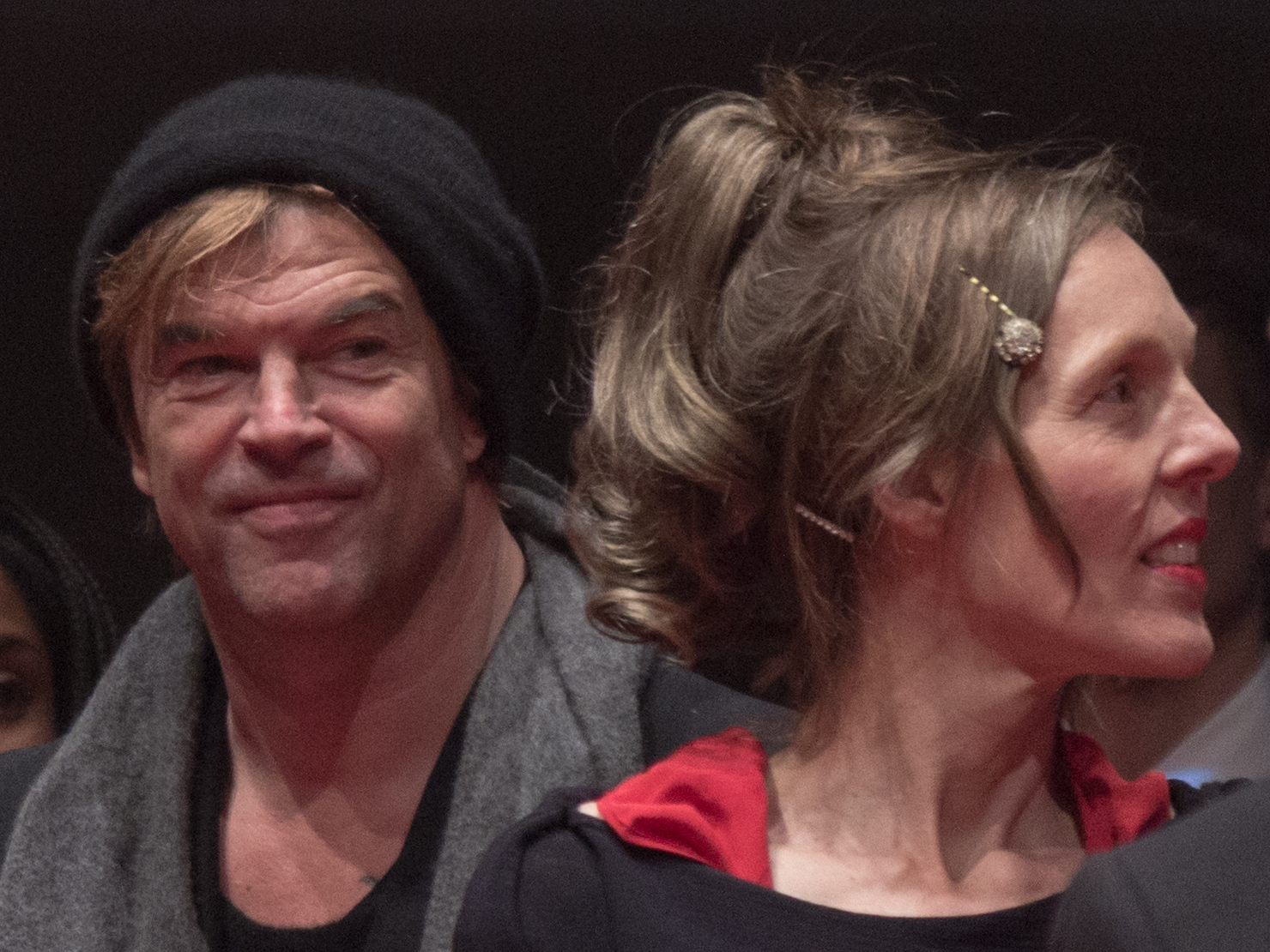 Campino und Donata Wenders auf der Berlinale